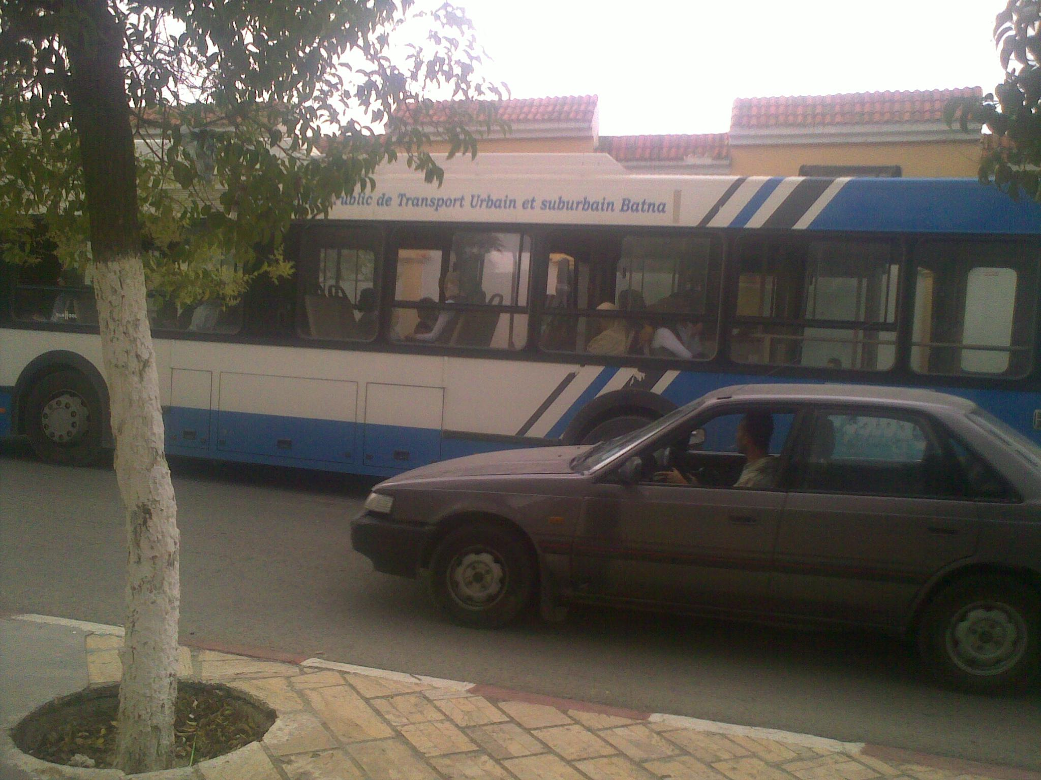 Transport urbain et suburbain de Batna (Algérie)